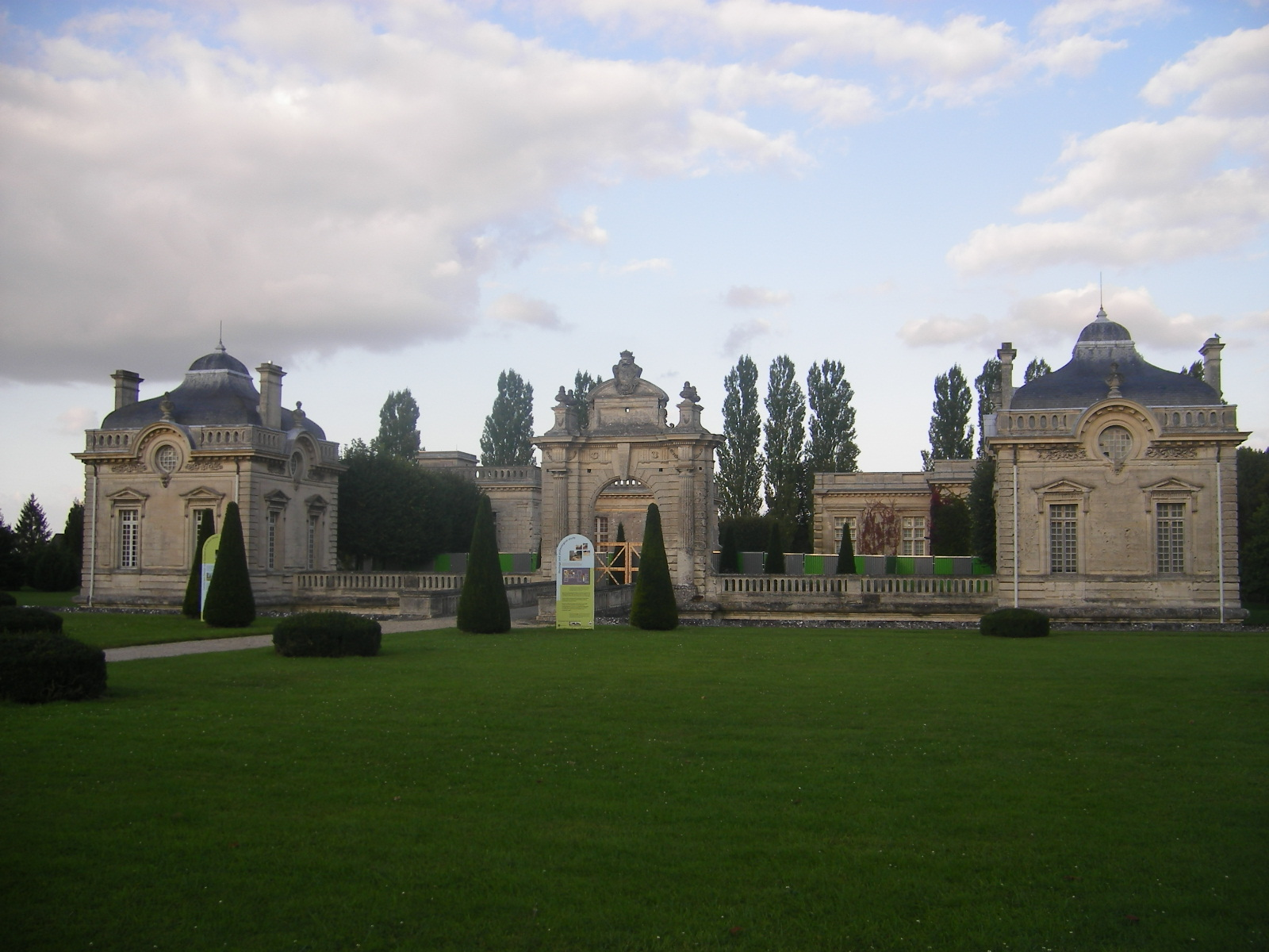 Blérancourt - castle